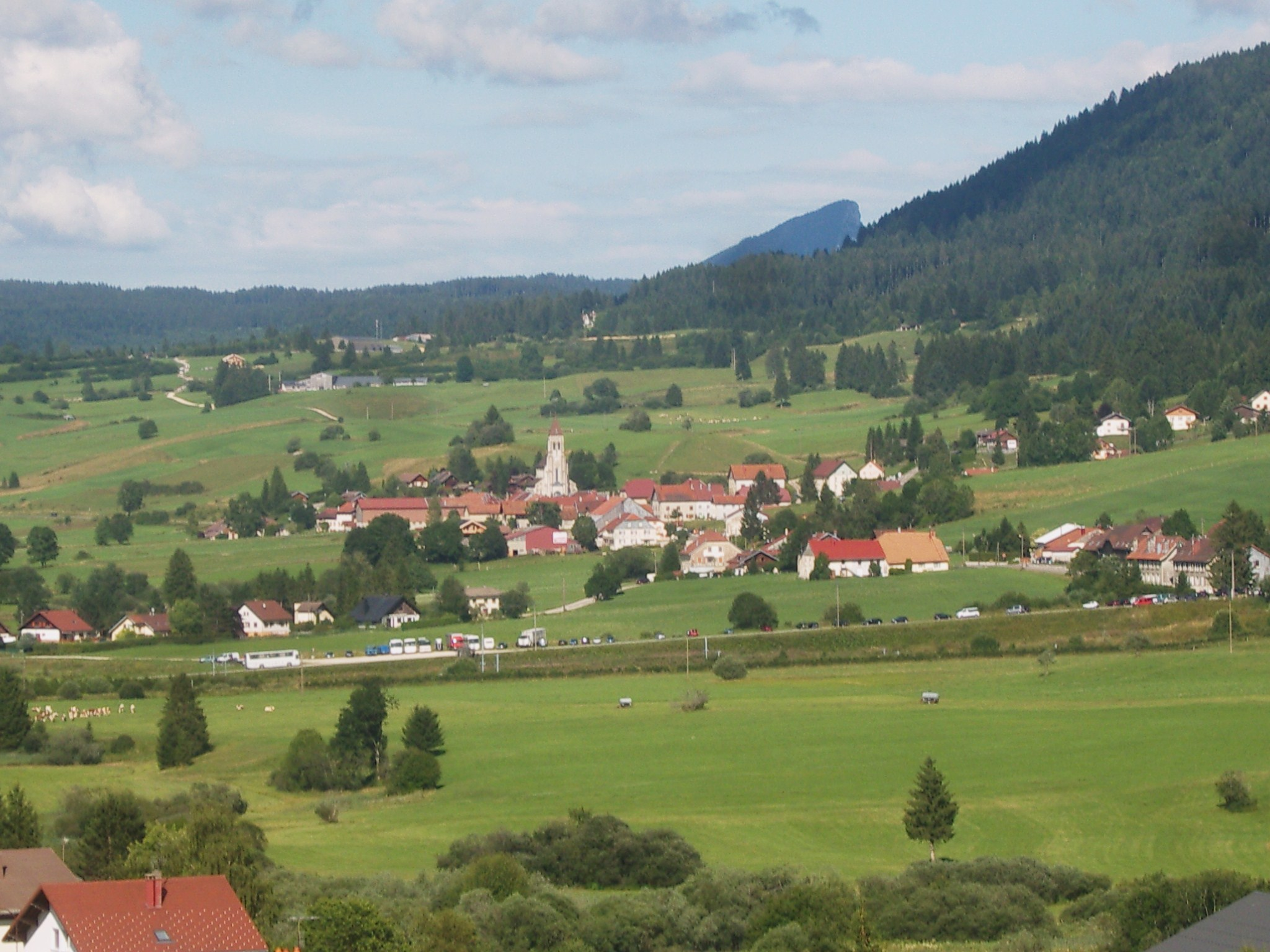 Longevilles-Mont d'Or, vue générale